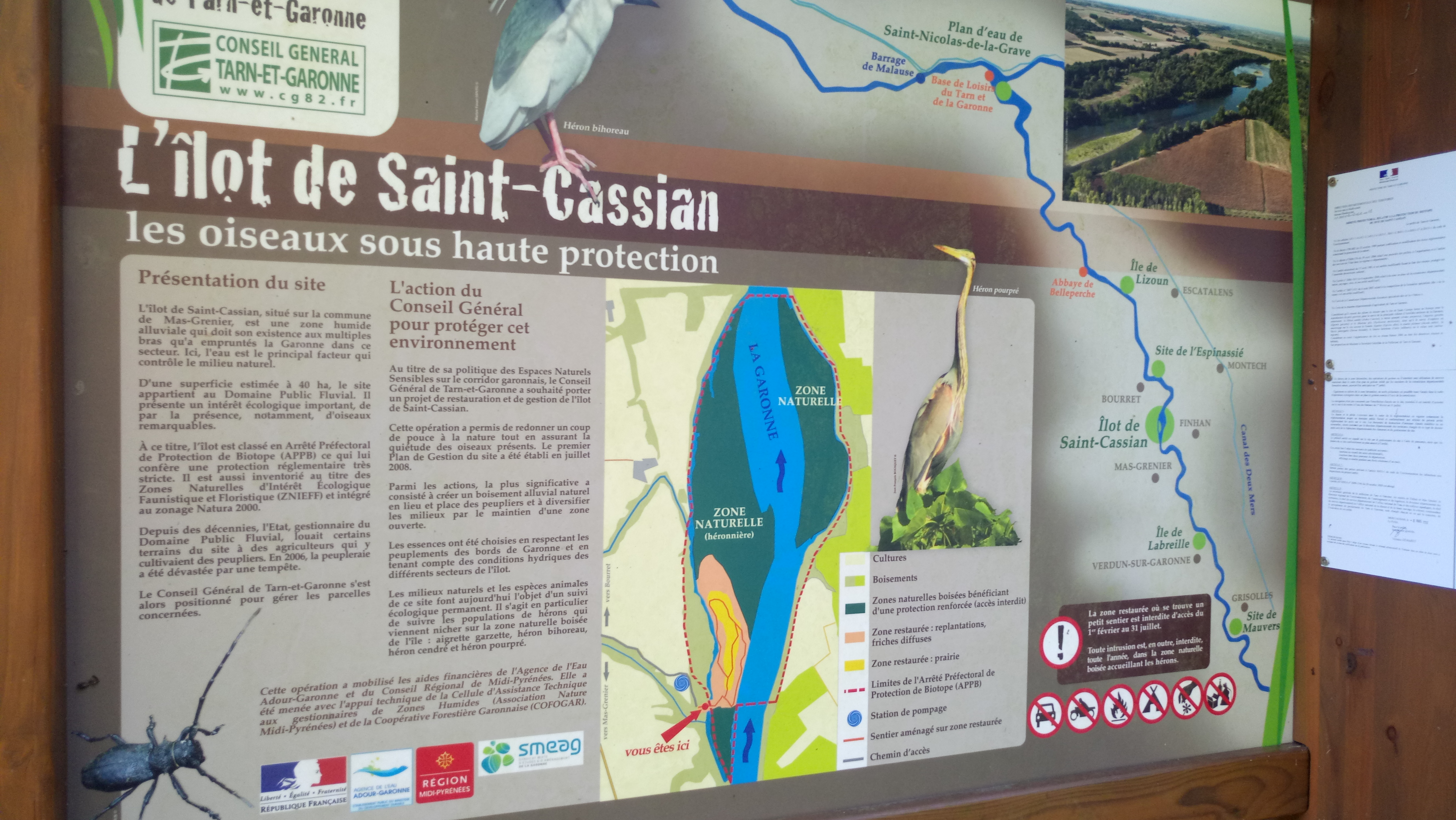 Panneau de présentation du site de l'Îlot de Saint-Cassian sur la commune de Mas-Grenier.